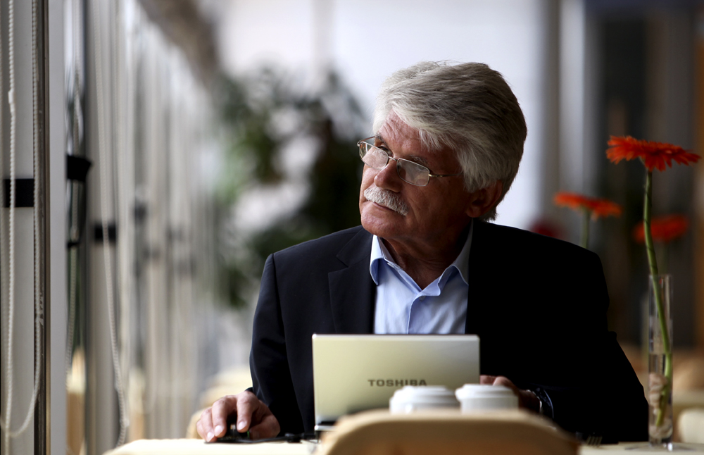 O candidato às eleições para o parlamento europeu, Vital Moreira, numa pausa durante o 1º dia de campanha eleitoral, 25 Maio 2009., em Aveiro.